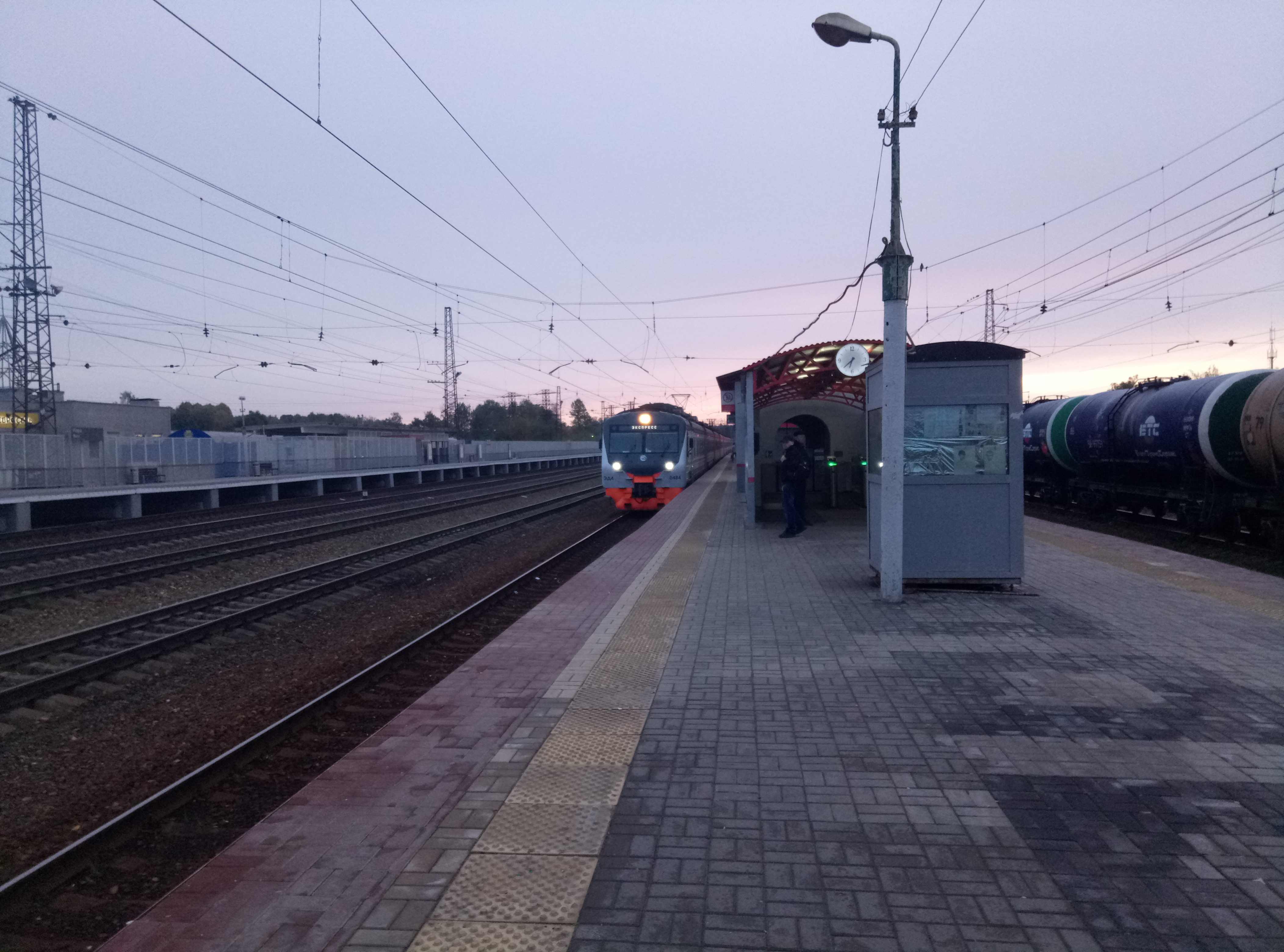 Станция Нара